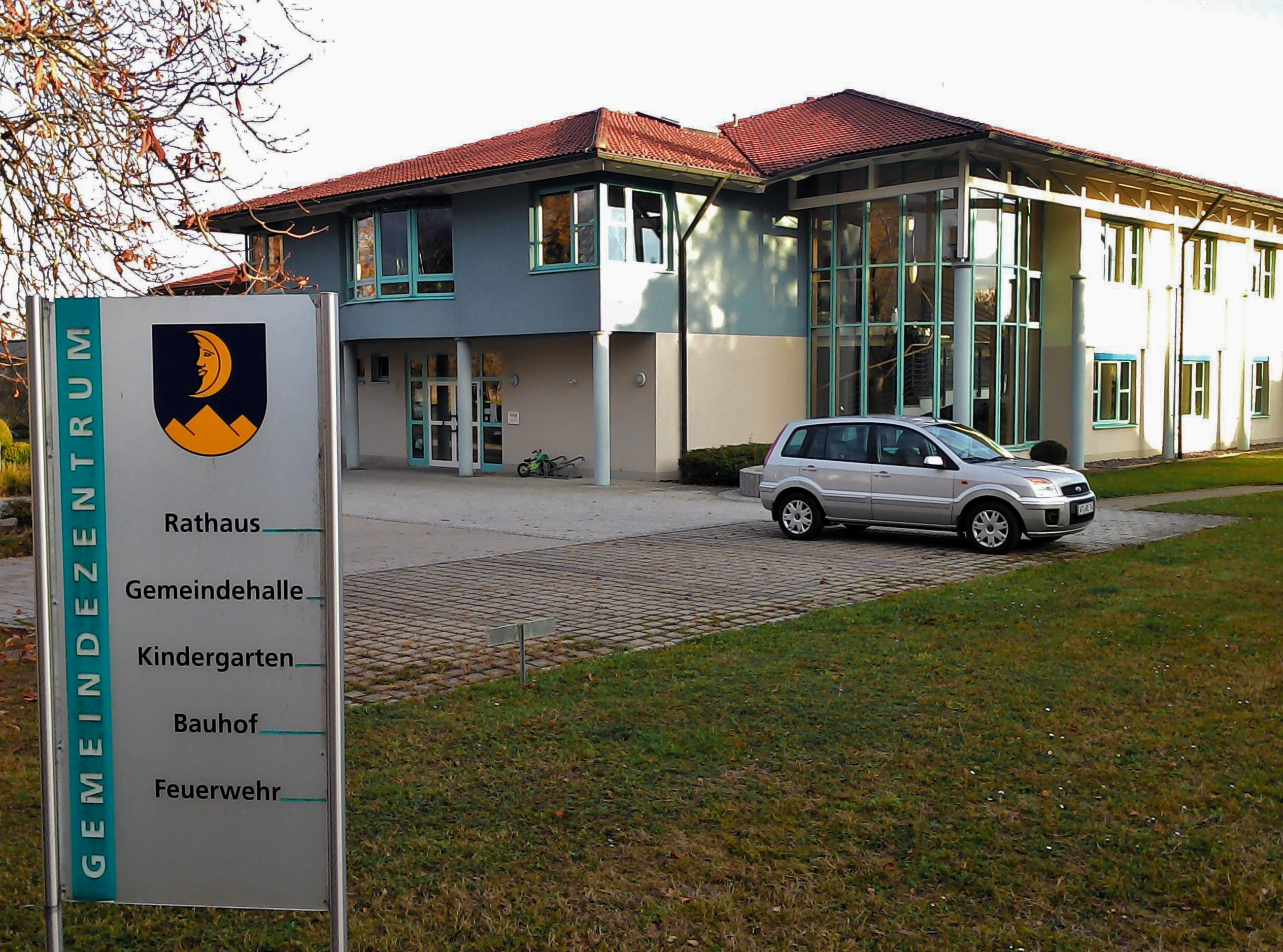 Rathaus von Dettighofen im Landkreis Waldshut, Baden-Württemberg, Deutschland.